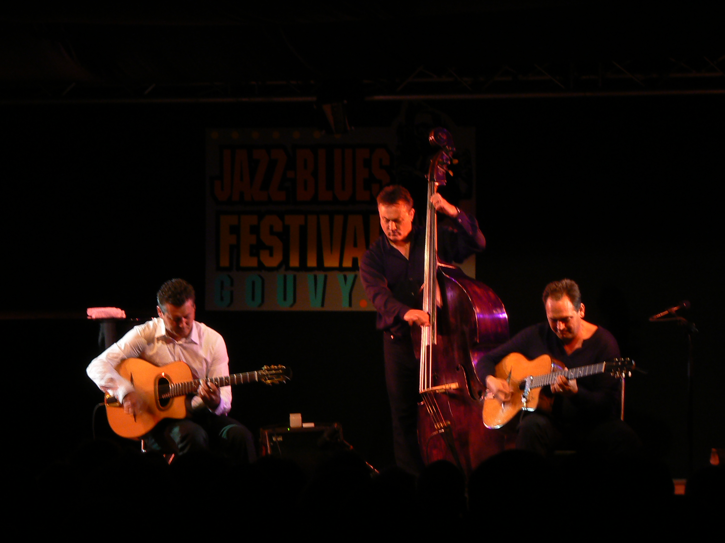 Le Trio Rosenberg (Pays-Bas) au Jazz & Blues Festival de Gouvy (Belgique), le 3 août 2007.